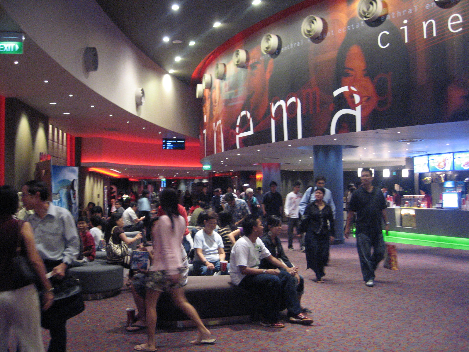 Golden Village at VivoCity, Singapore.